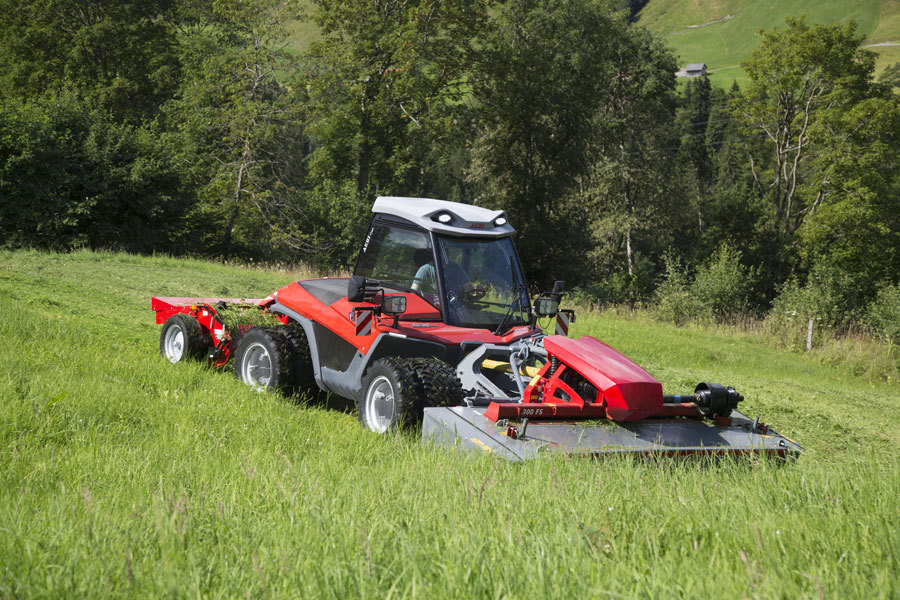 Aebi TT281